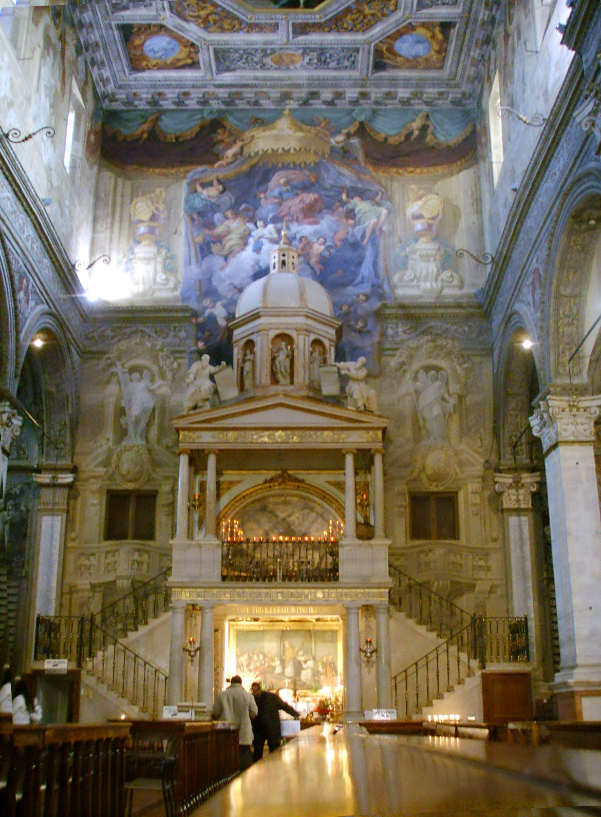 Ferrara, santa maria in vado, interno